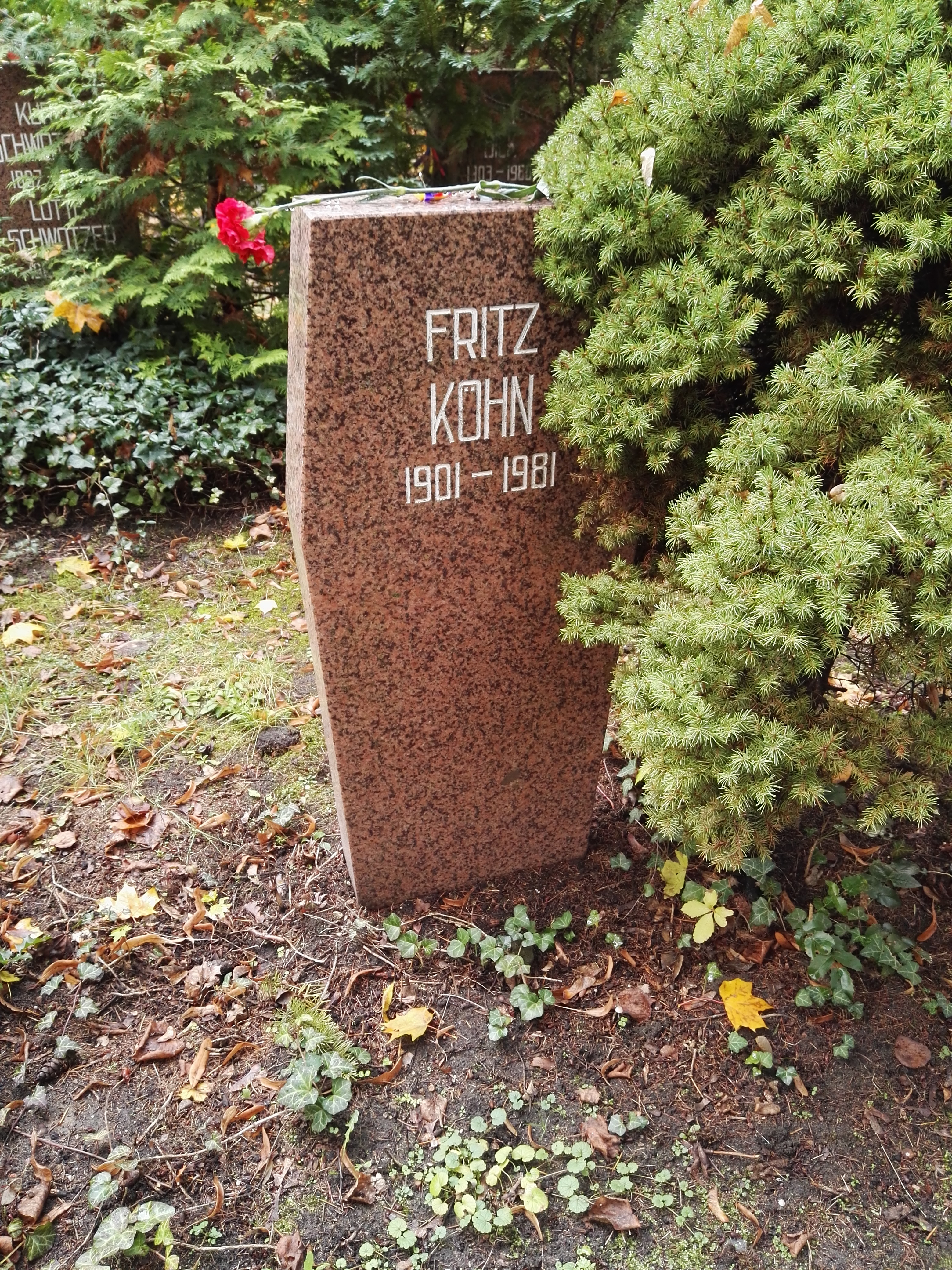 Grab von Fritz Köhn auf dem Sozialistenfriedhof des Zentralfriedhofs Friedrichsfelde